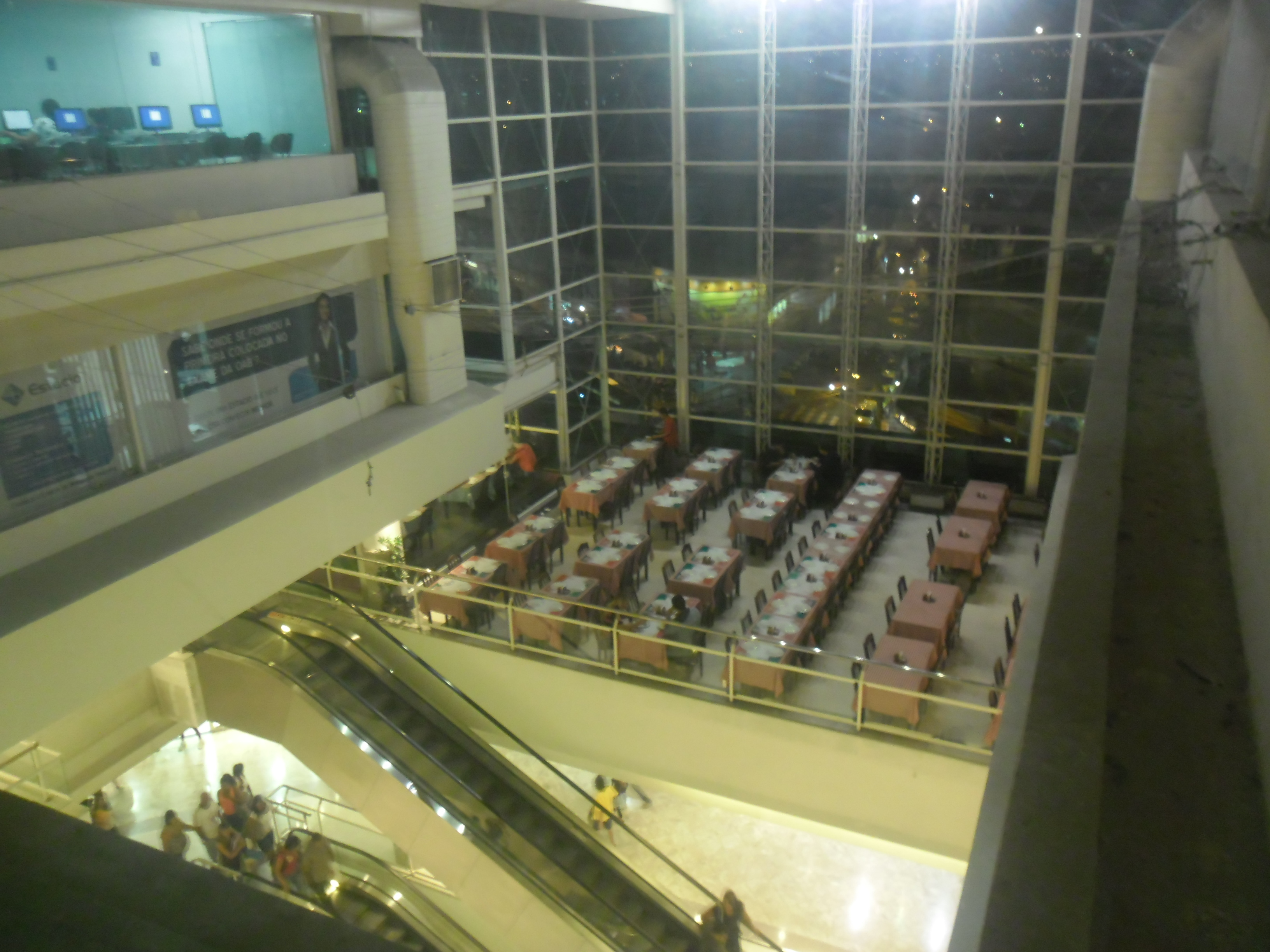 Madureira Shopping, foto tirada do último piso, dentro do campus da Universidade Estácio de Sá.